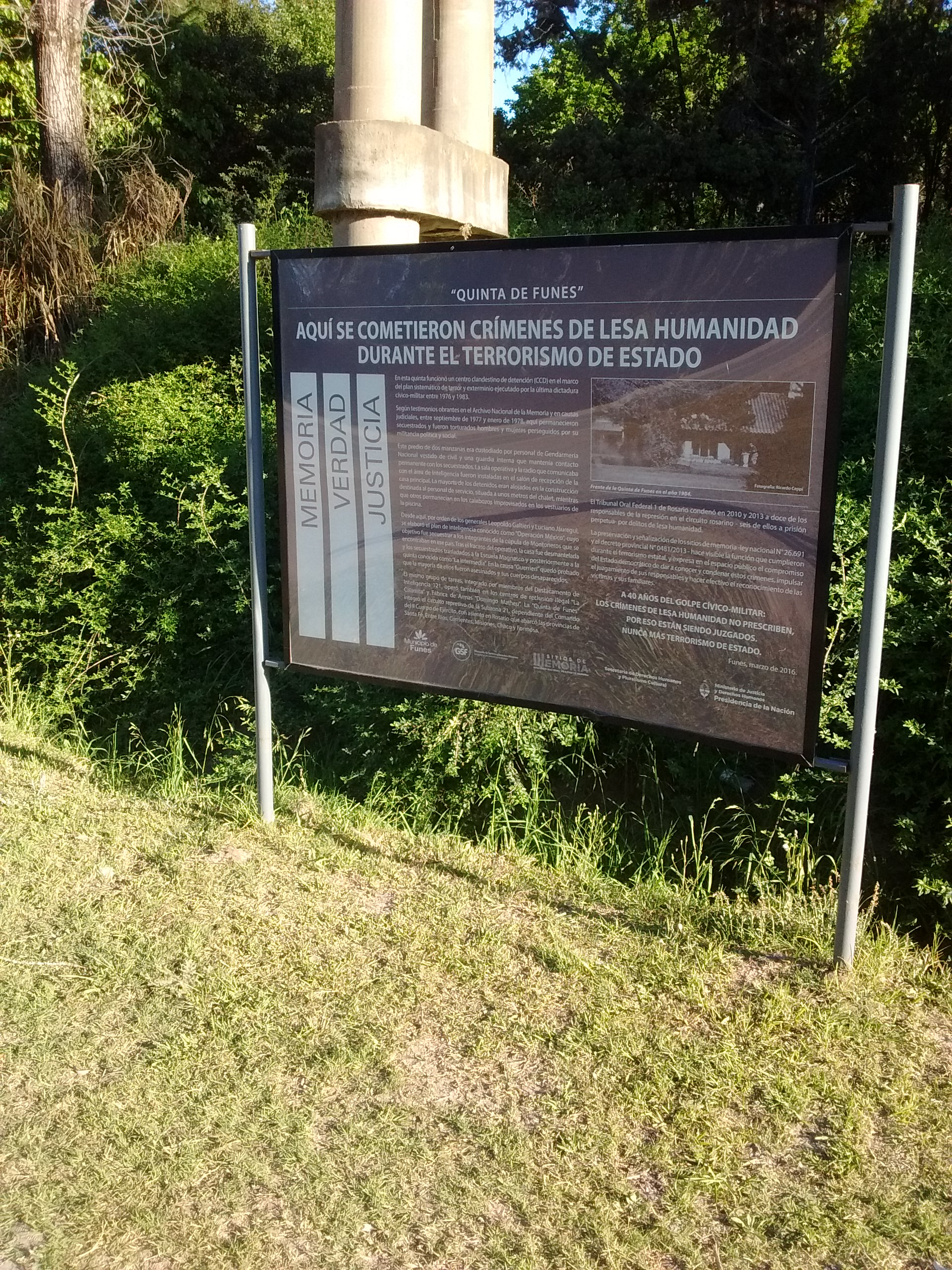 Cartel informativo situado en la entrada del antiguo centro clandestino denominado «Quinta de Funes», en Funes.